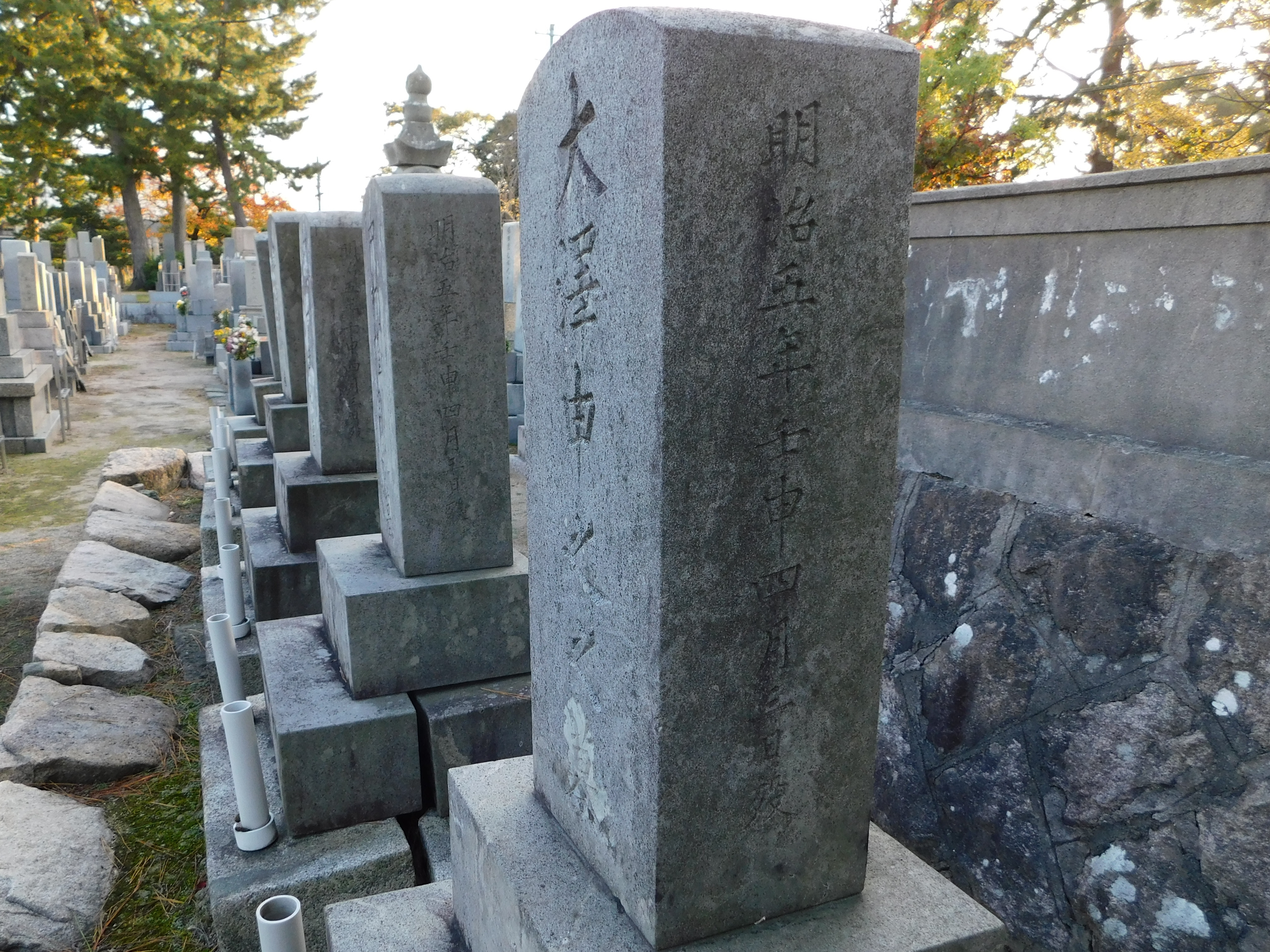 鞠山藩士5名の墓、明治元年に藩政を専横しようとした家老を殺害した、1名病死、4名切腹。福井県敦賀市来迎寺。